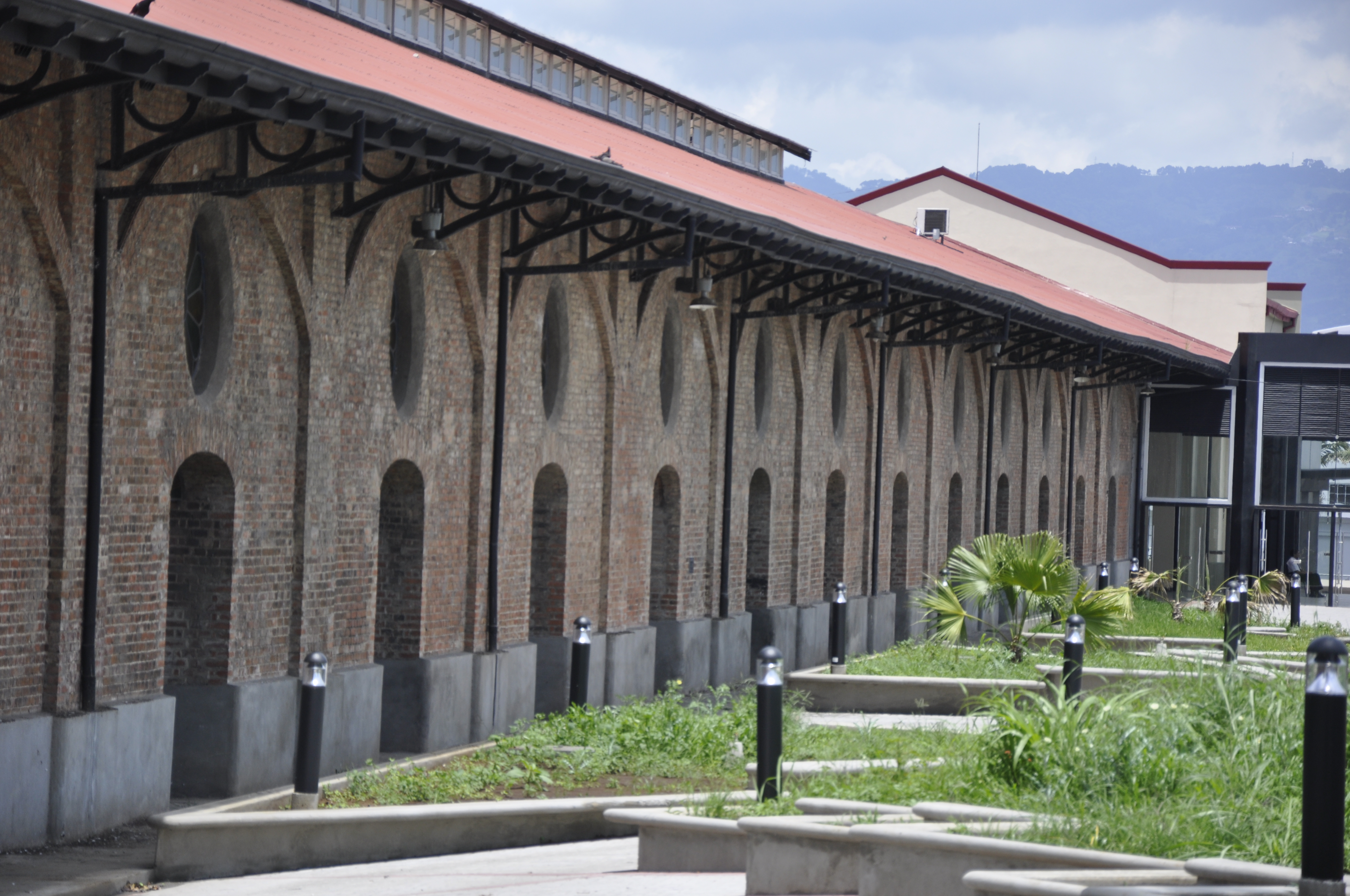 Edificio de la Antigua Aduana, Barrio La California, San José, Costa Rica